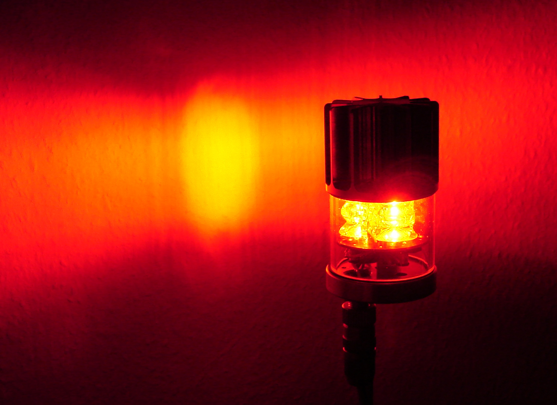 LED-Hindernisfeuer